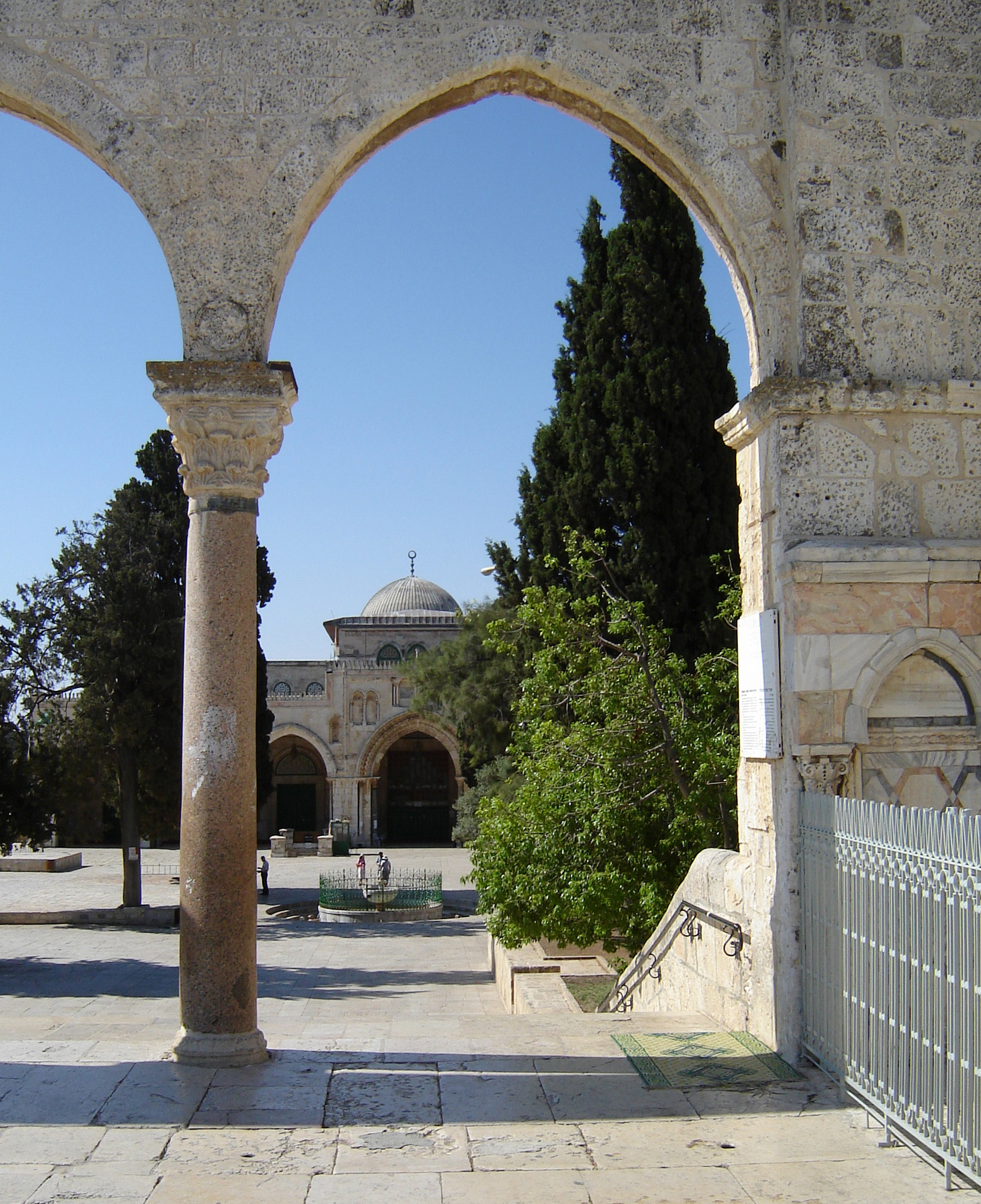 Felsendom Jerusalem